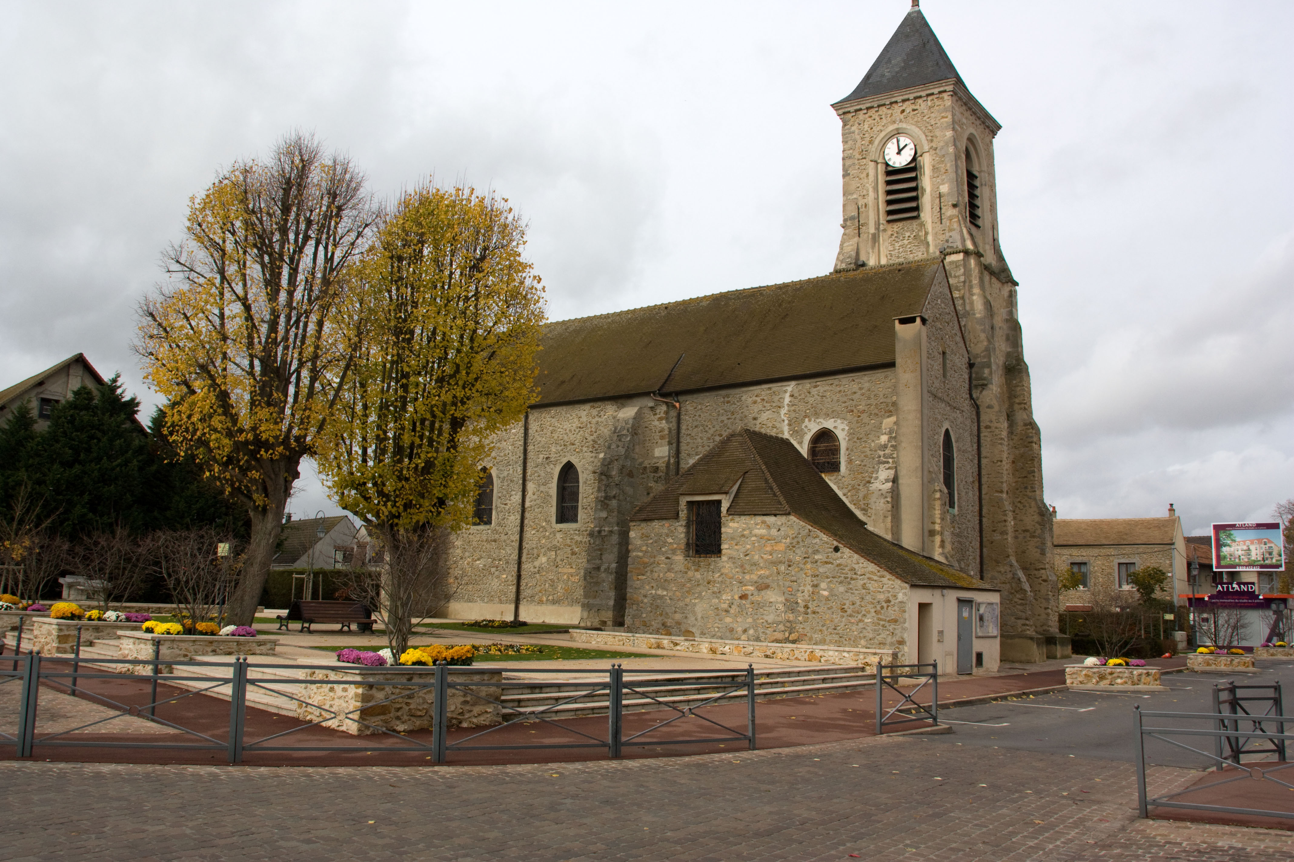 Eglise de Bondoufle, Bondoufle, Essonne, France